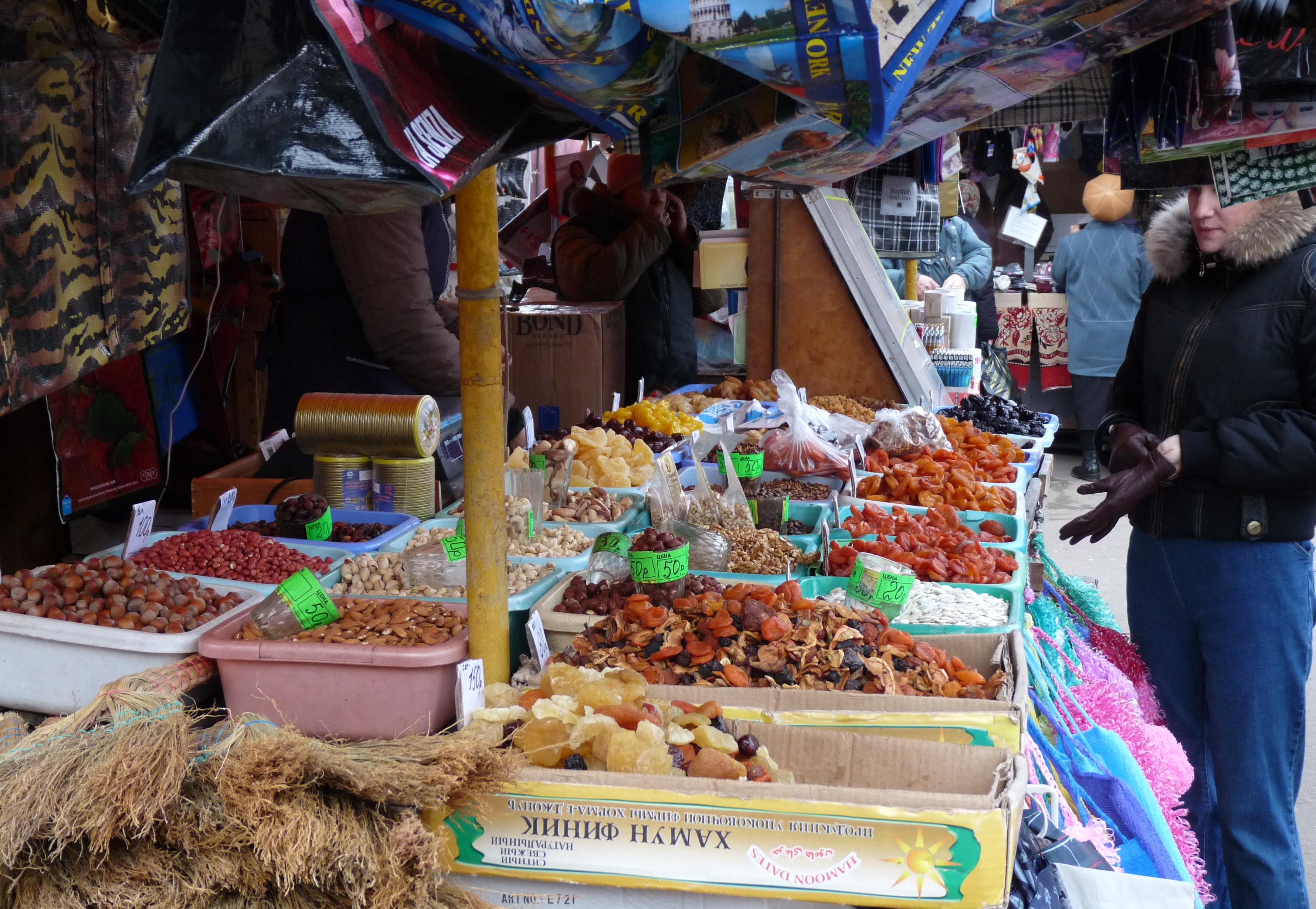 Kostroma Market 10